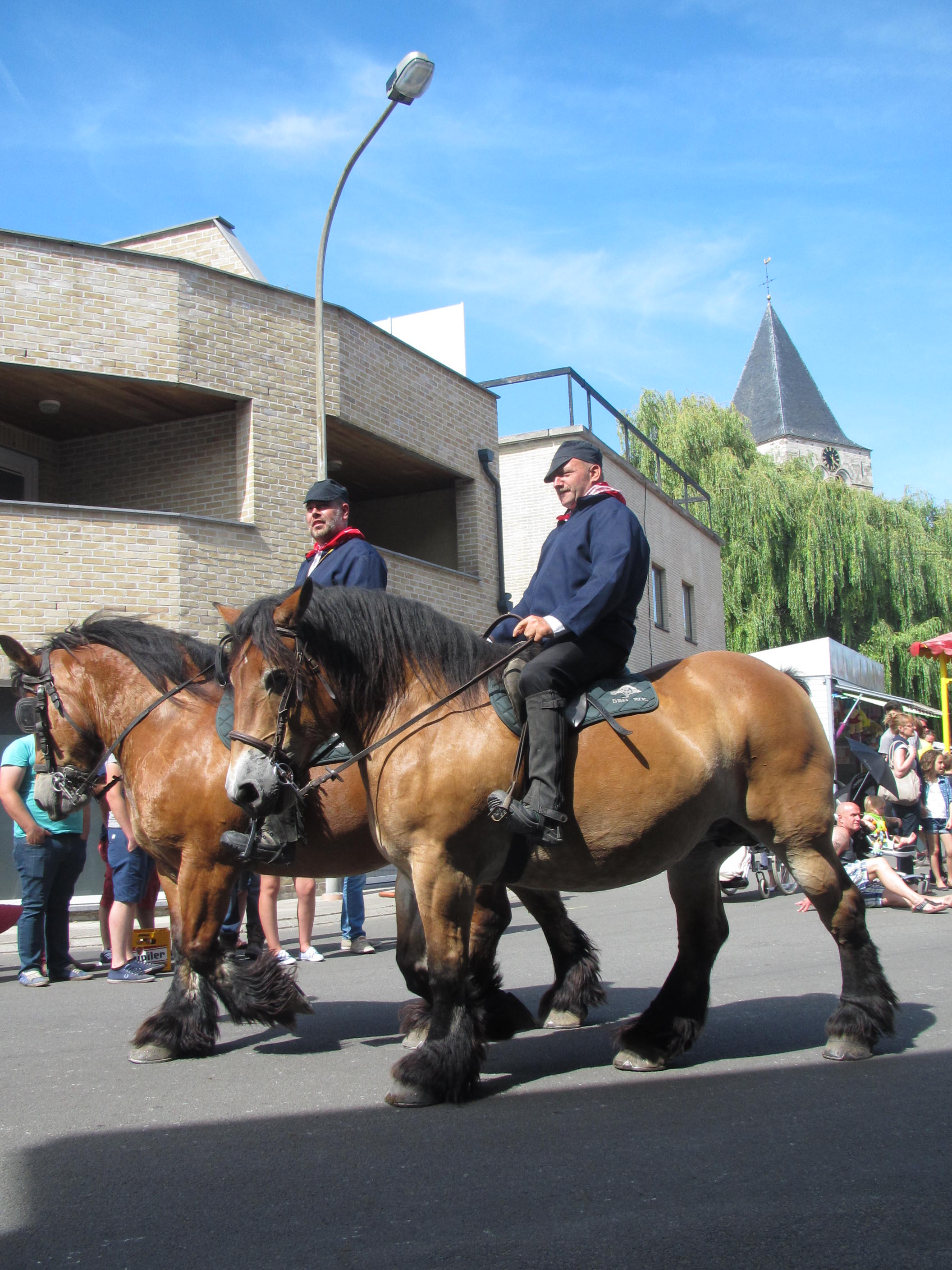 Twee boeren op een Brabants of Belgisch Trekpaard op bedevaart naar Sint-Paulus